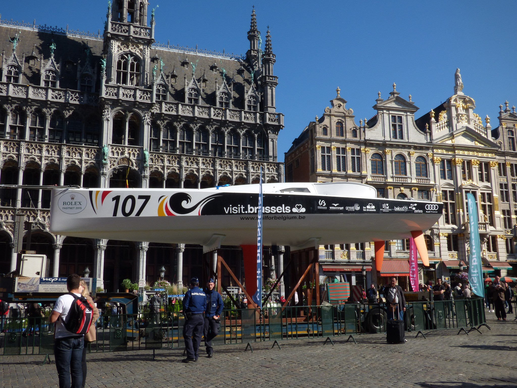 Visit Brussels, Class40 zeilboot die deelnaam aan Fastnet 2015 (werd vijfde, skipper Michel Kleinjans)